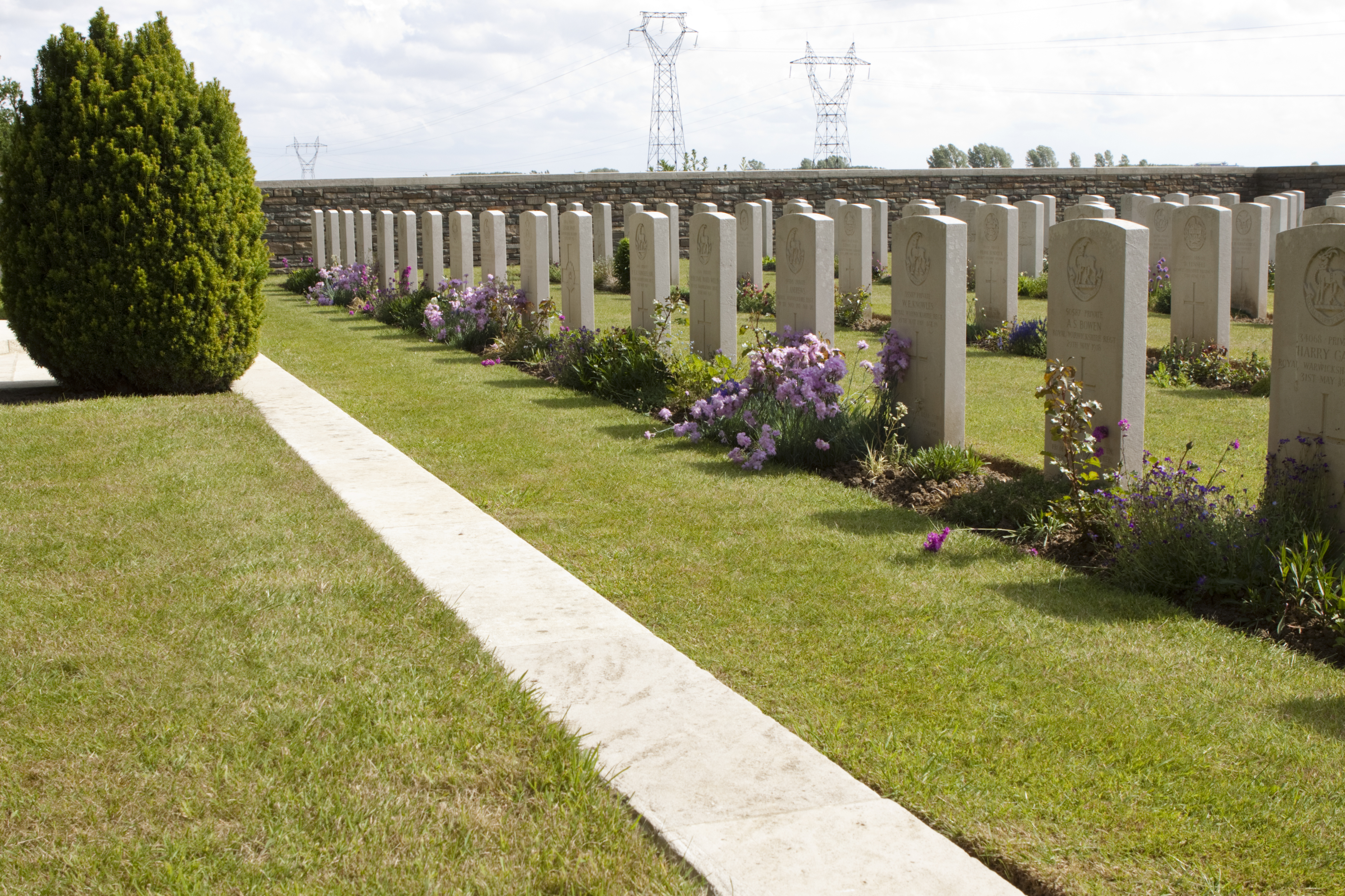 Thiennes British Cemetery